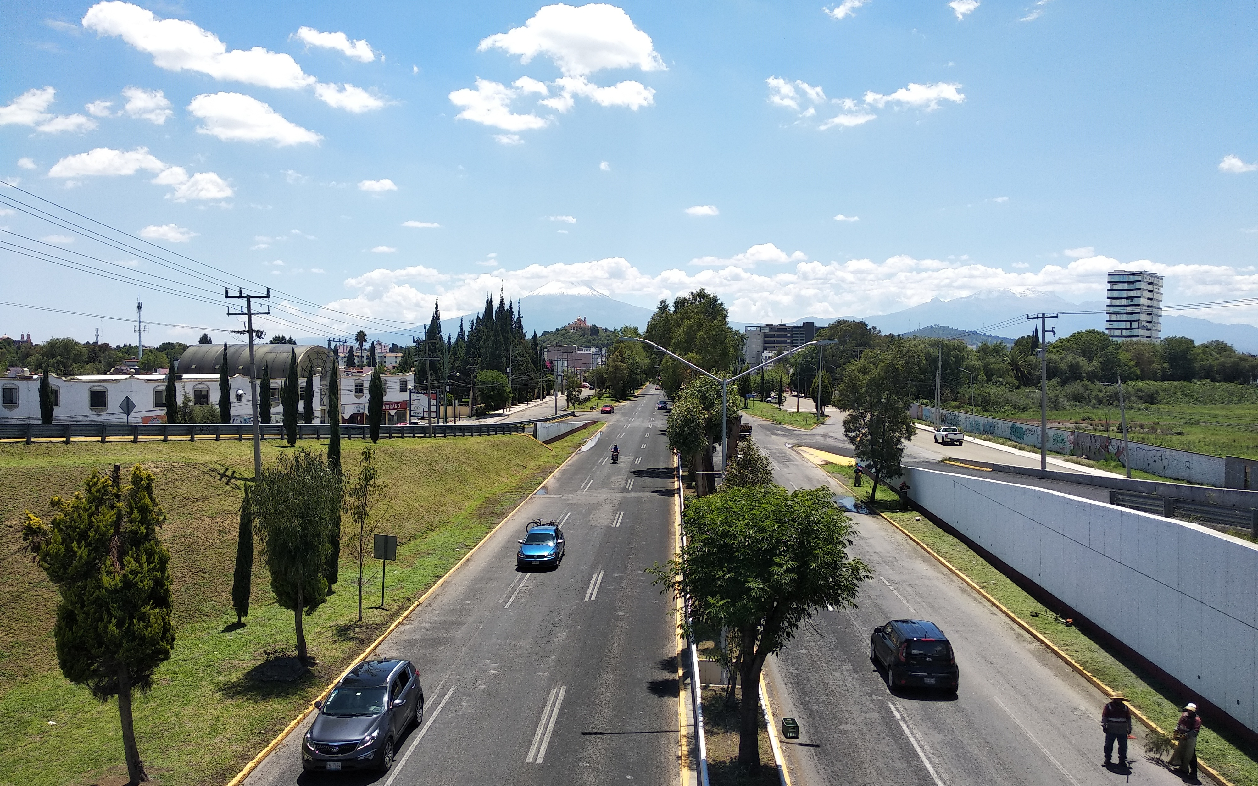 La Recta a Cholula es una carretera que conecta las ciudades de Puebla y Cholula (estado de Puebla, México). Esta foto fue tomada desde el distribuidor vial UDLAP. Al fondo del lado izquierdo, se aprecian la Gran Pirámide de Cholula y el volcán Popocatépetl.